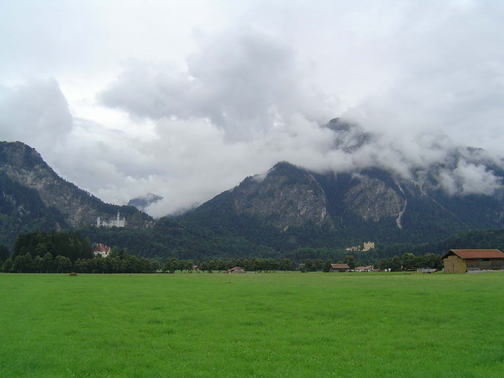 Castillos de Neuschwanstein y Hohenschwangau